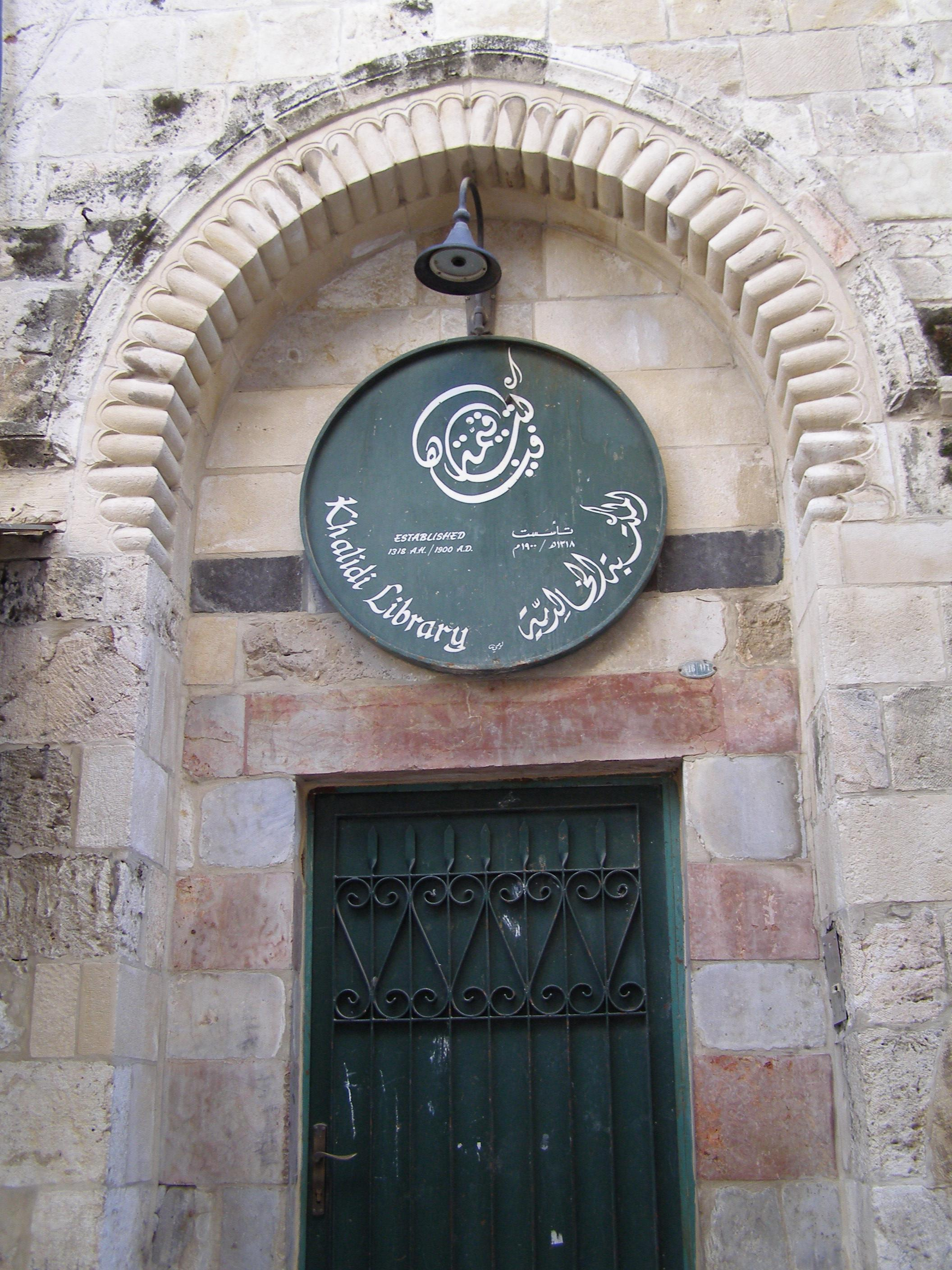 ספריית חלדיה רישיון נוצר על ידי משתמש:Ranbar